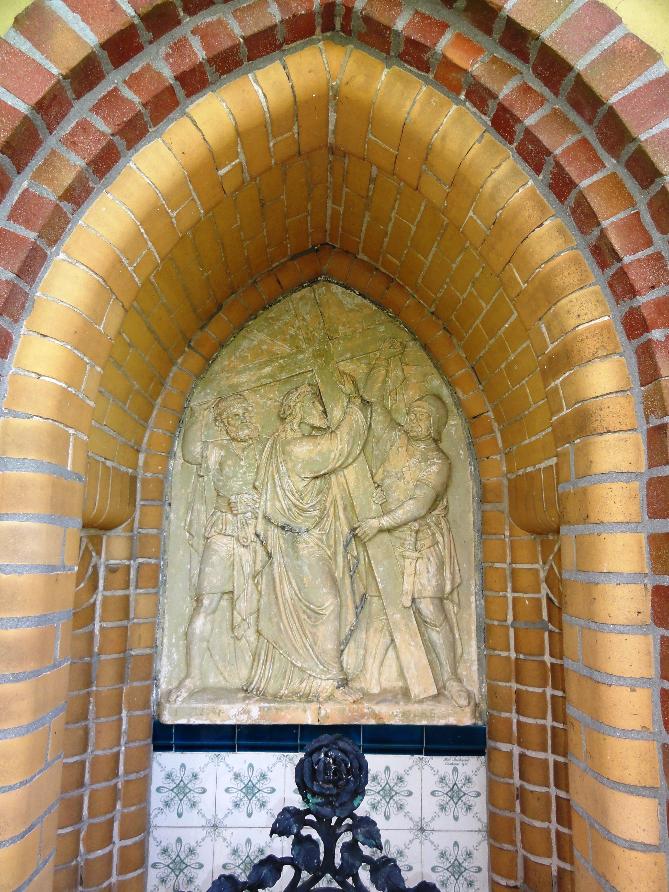 Venray Oostrum